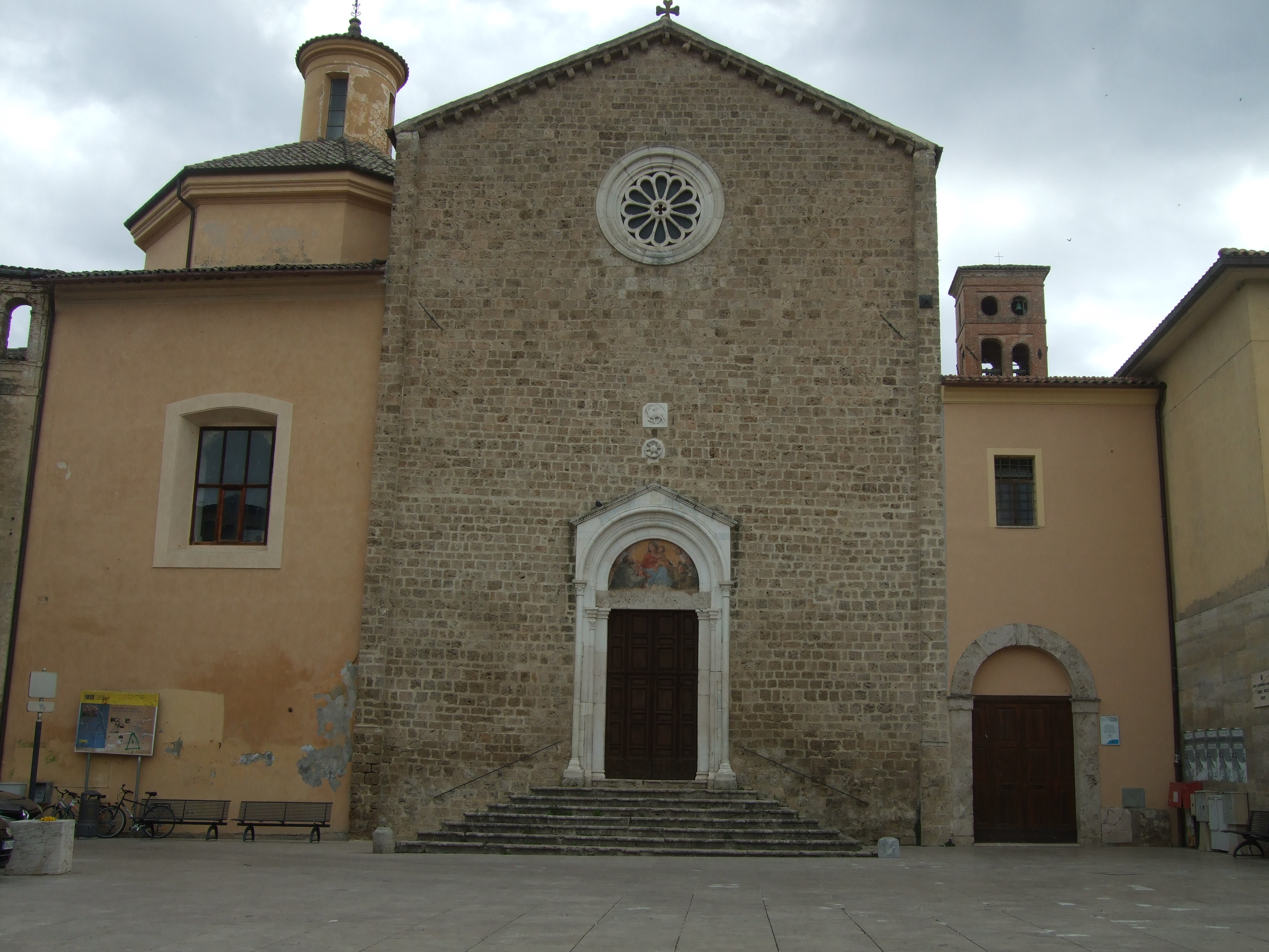 religiosità